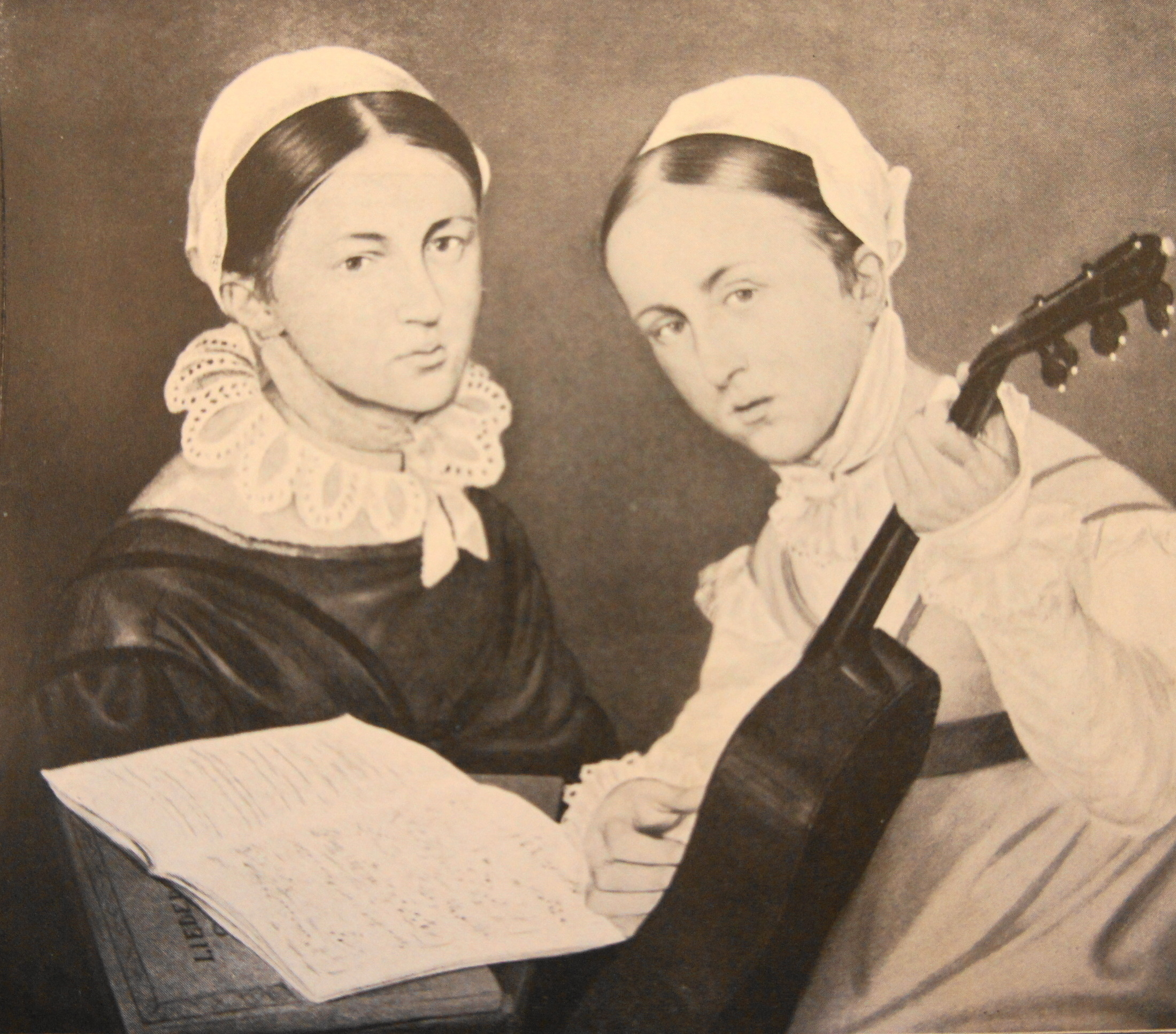 Amalie Geller mit der Gitarre und ihre Schwester. In: Hans Geller: Ein Jünger der "göttlichen Kunst". Das Lebensbild des Nazareners Adolf Zimmermann. In: Neues Lausitzisches Magazin, Band 110 (1934), S. 171-229 und Anhang.